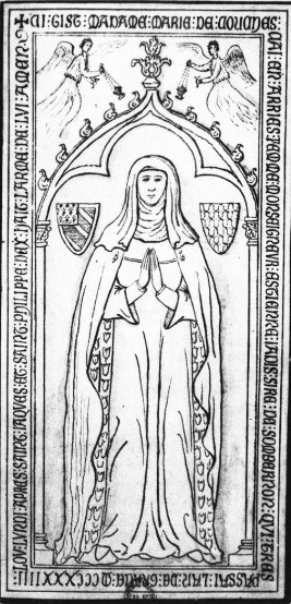 Marie de Couches, femme dEtienne de Sombernon. Inscription sur le pourtour : "ci•gist•madame•marie•de•couches•cai•en•arries•femme•monseigneur•estienne•jadis•sire•de•sombernon•qui•trespassai•lan•de•grace•MCCCXXXIIII (1334)•lou•lundi•apres•saint•jacques•et•saint•philippe•dax (?)•hait (?)•larme (?)•de•LVI (?)•amen".